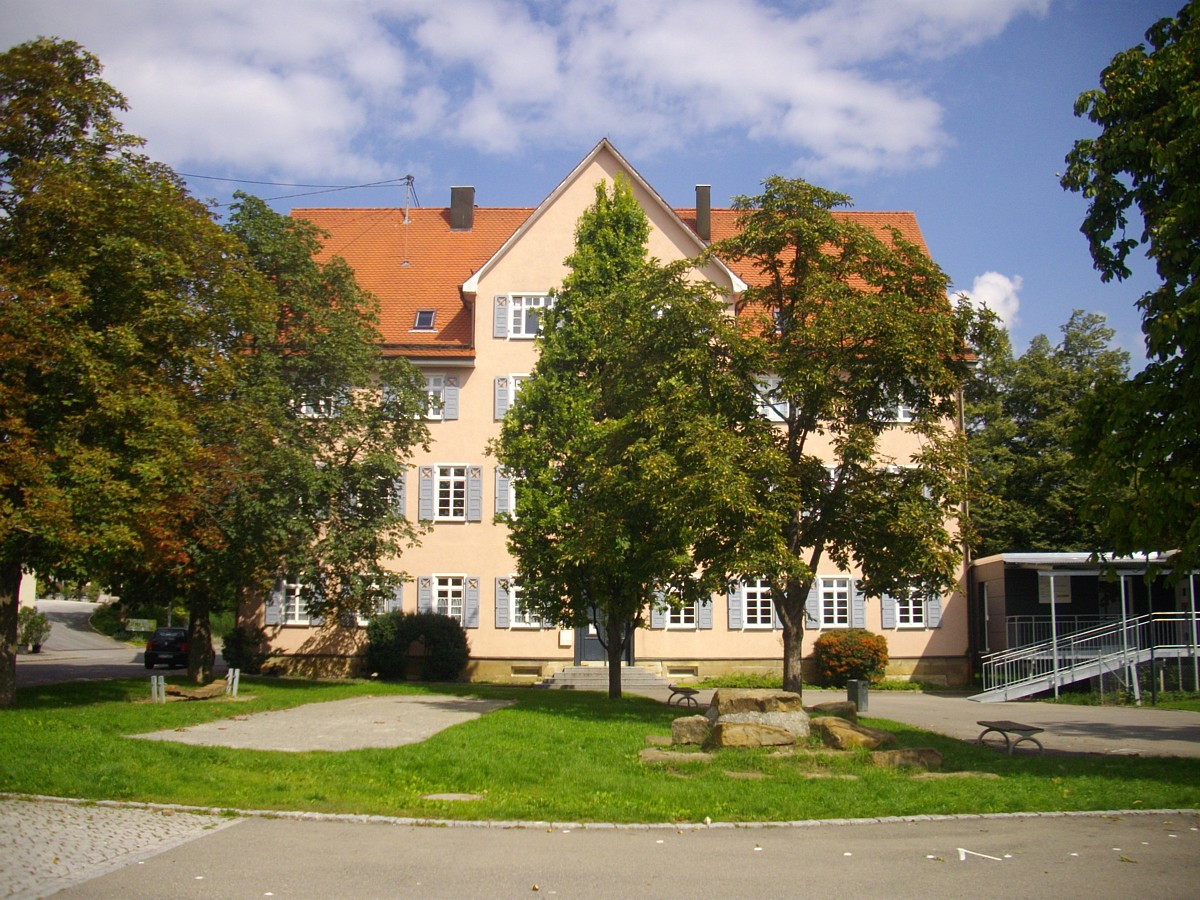 Eningen unter Achalm, Landkreis Reutlingen, Spital